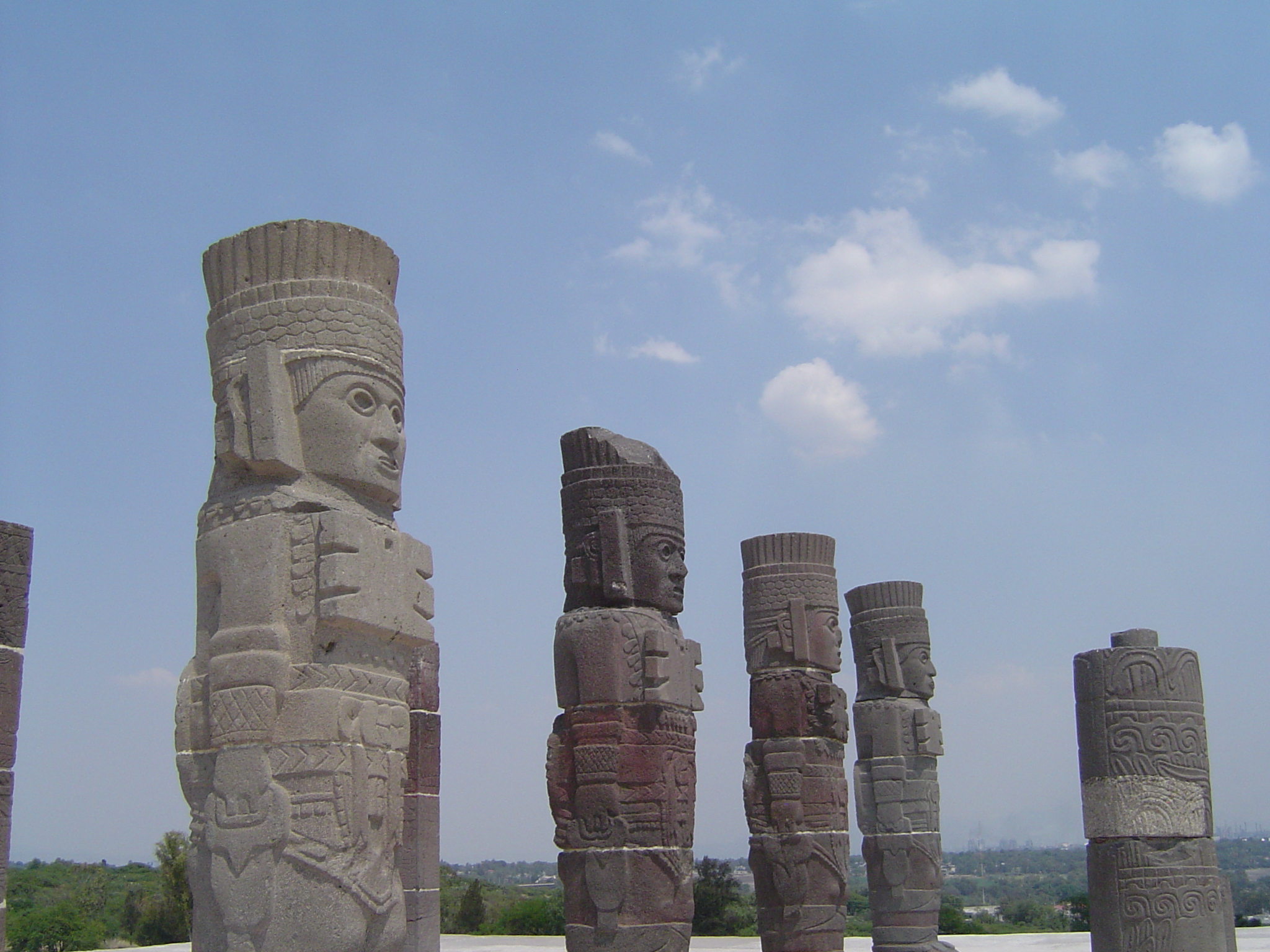 Los atlantes de Tula